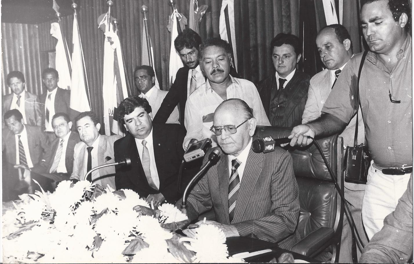 Posse do presidente José Fernandes de Lima, ao seu lado Roberto Paulino.